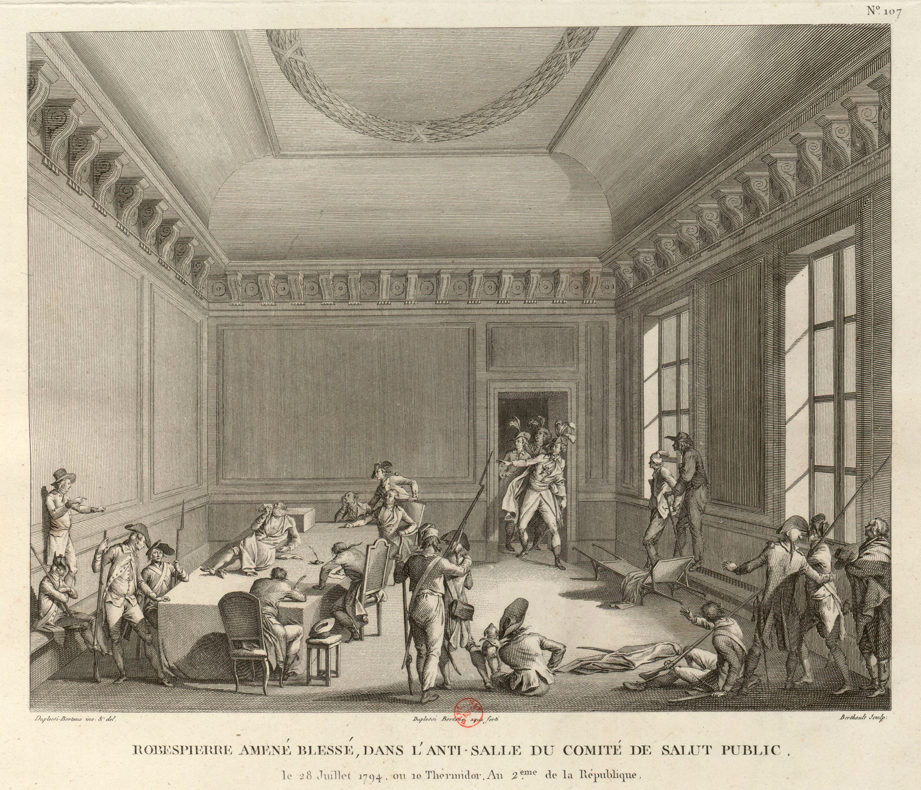 Robespierre amené blessé dans l'anti-salle du comité de salut public, 28 juillet 1794. Tableau nº 107, extrait de la Collection complète des tableaux historiques de la Révolution française.